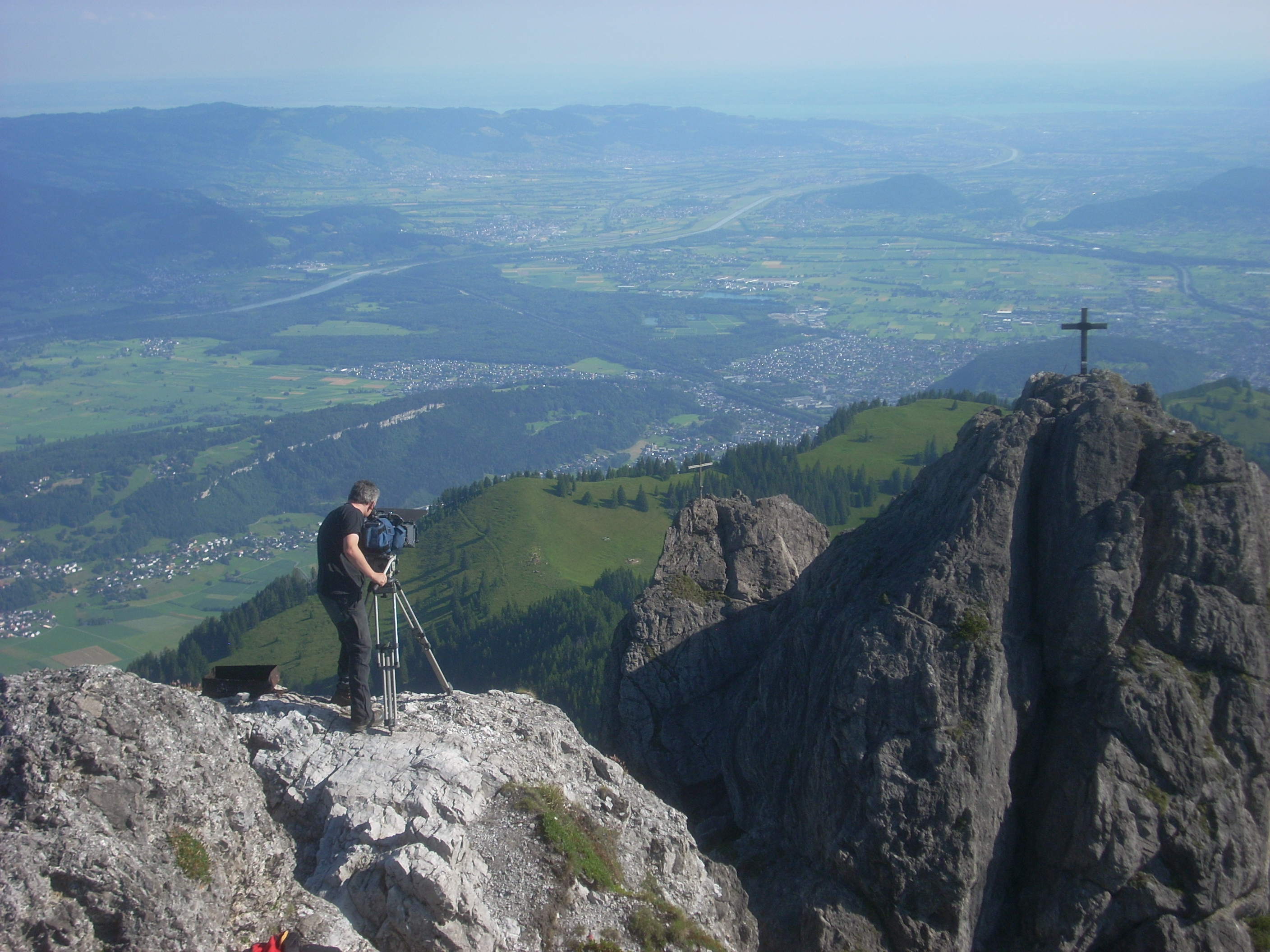 Blick von den Drei Schwestern nach Norden in das Vorarlberger Alpen-Rheintal, links Schellenberg / Eschnerberg, in Bildmitte Nofels, Gisingen, Waldgebiet Rote Au mit Naturschutzgebiet Matschels und Ill-Fluss, im Hintergrund Mündung des Rheins in den Bodensee